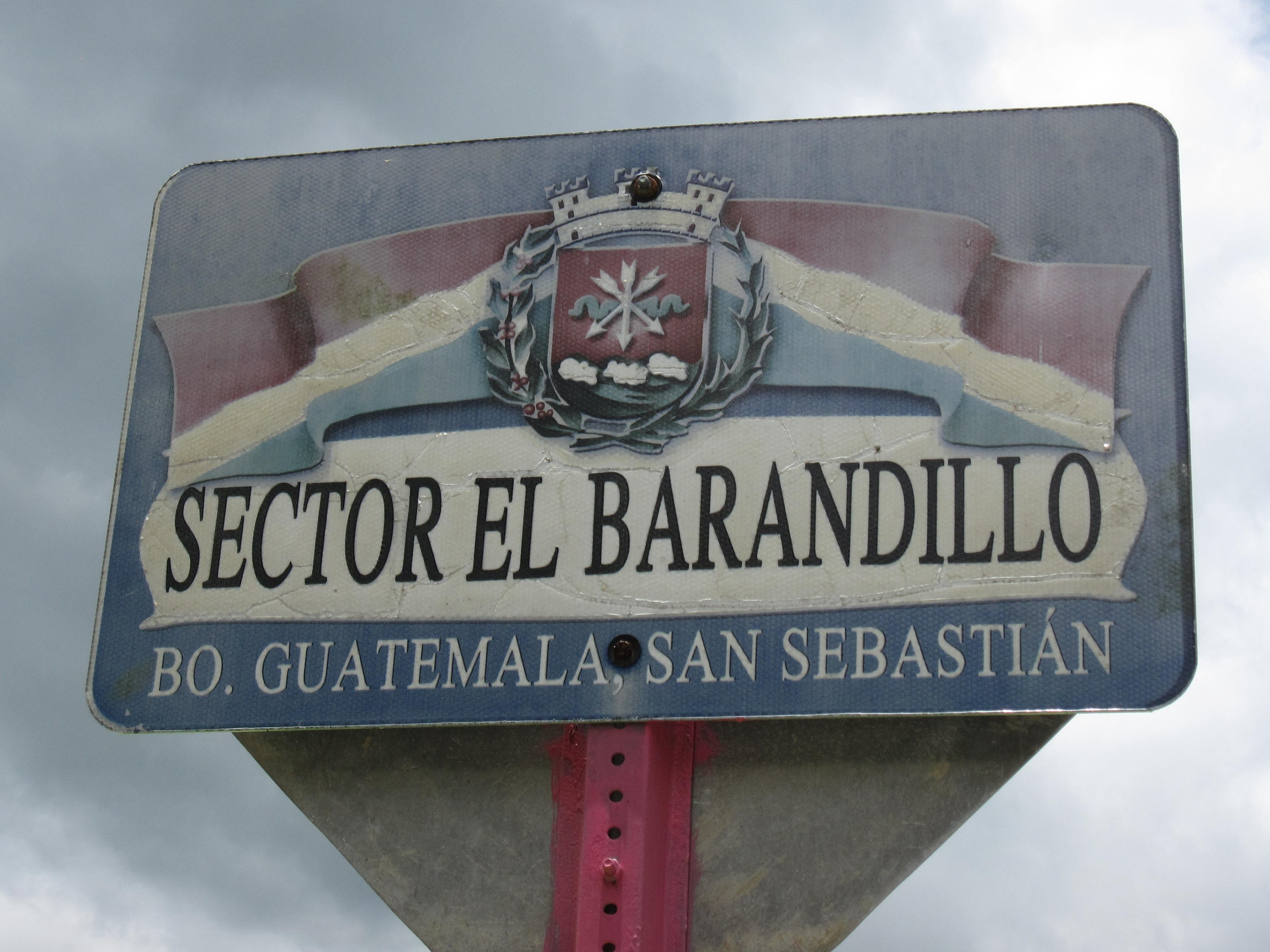 Sector El Barandillo en Barrio Guatemala en San Sebastián, Puerto Rico